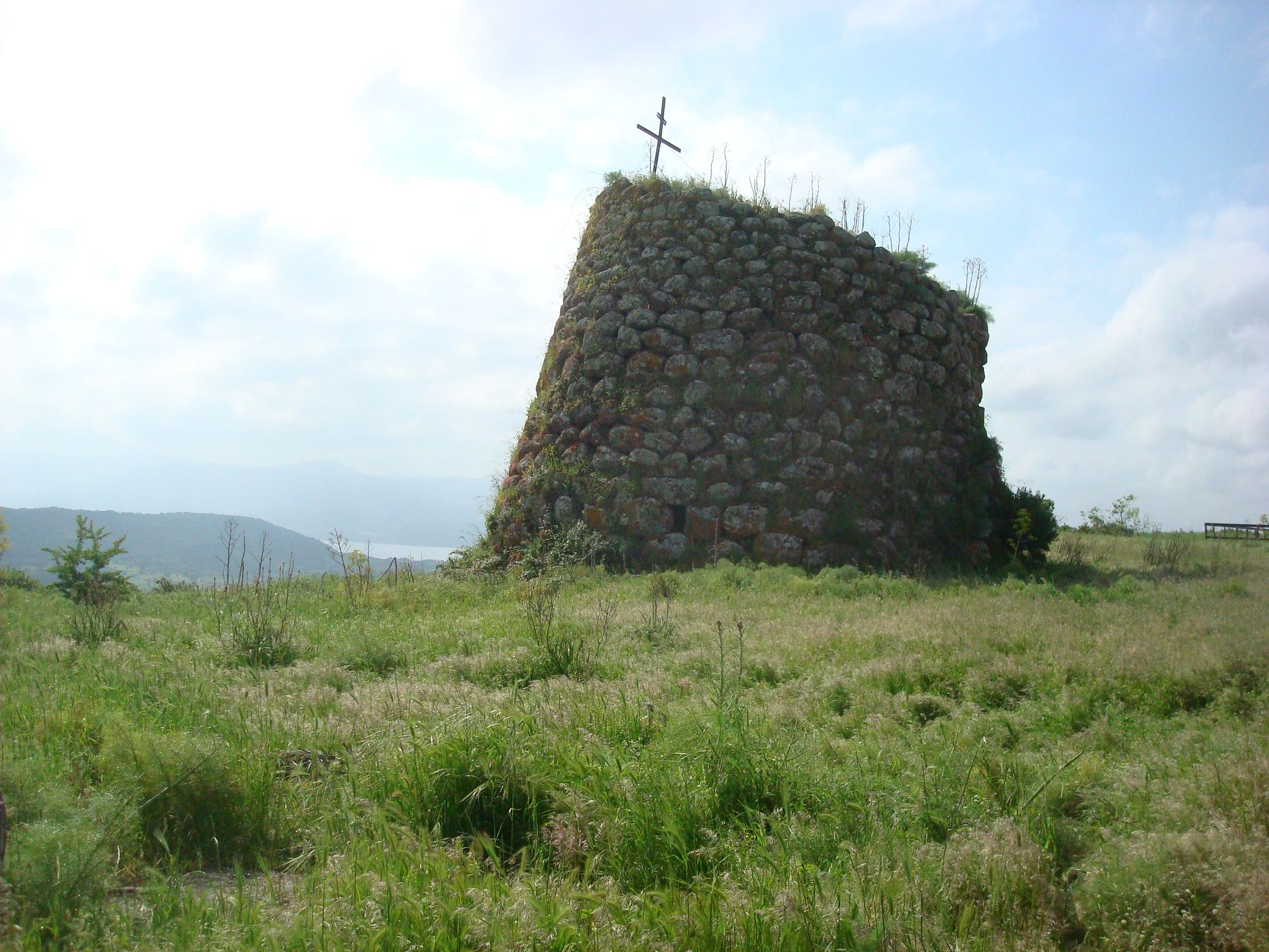 Nuraghe presso il campo sportivo di Aidomaggiore con vista sul lago Omodeo.